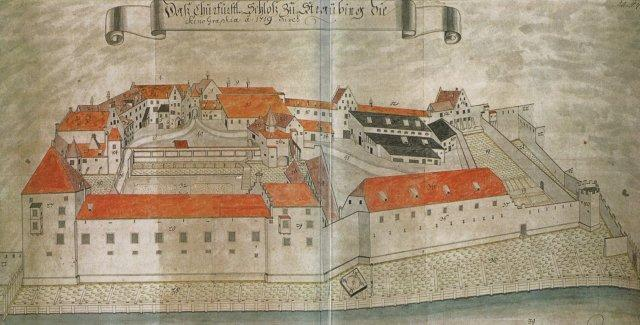 Plan des Herzogsschloss